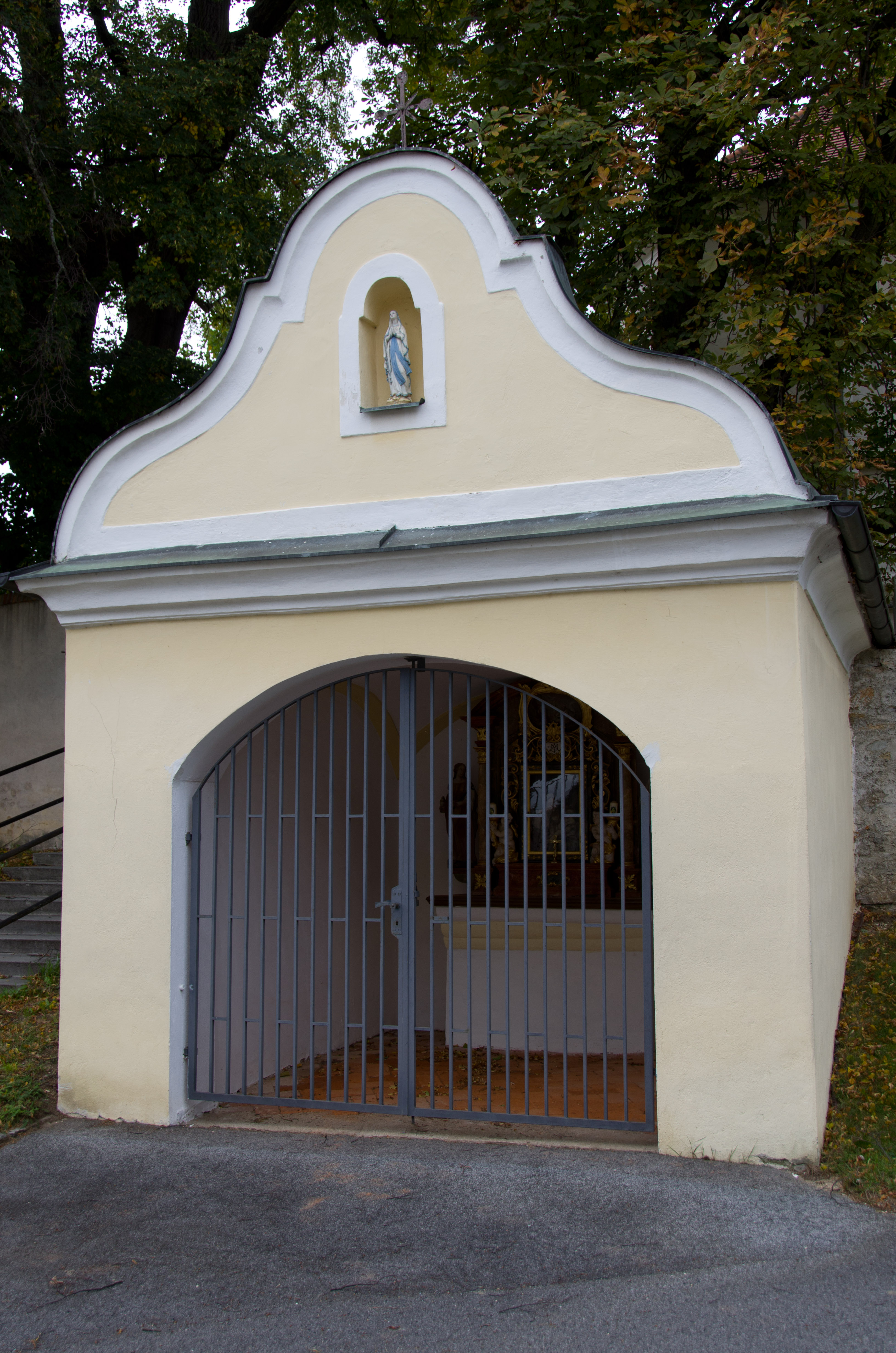 Marienkapelle an der Friedhofsmauer